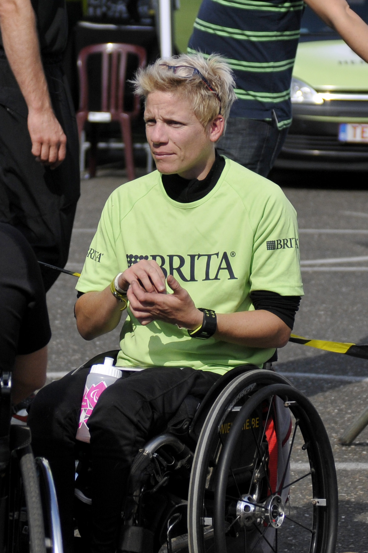 Marieke Vervoort, september 2012